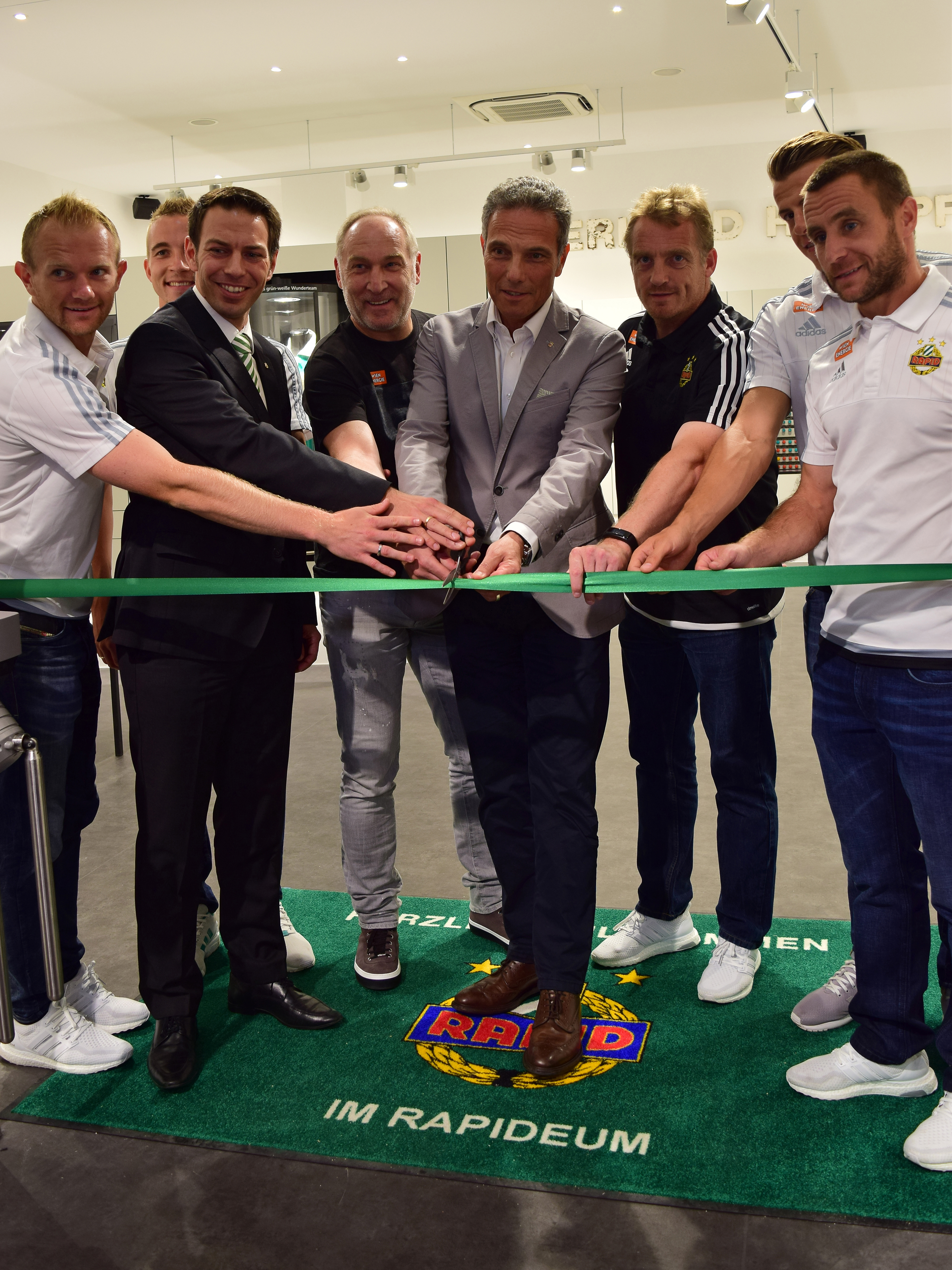 Eröffnung des neuen Rapideums im Allianz-Stadion